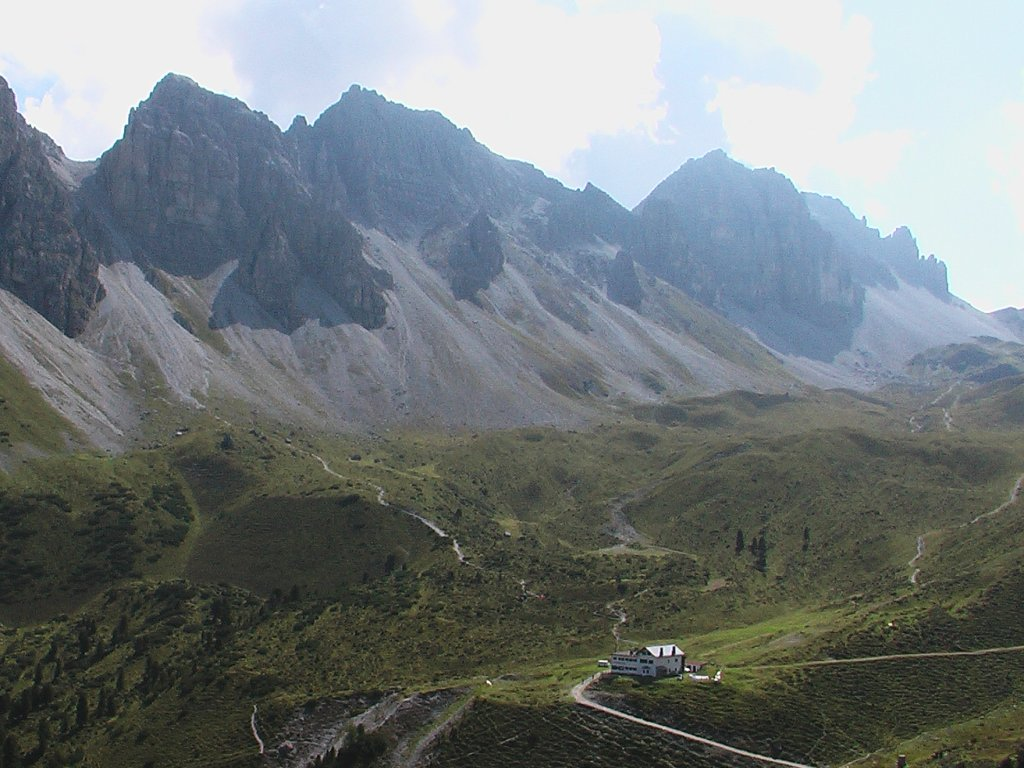 Adolf-Pichler-Hütte in den Stubaier Alpen in Tirol. Selbst fotografiert (leider mit Videokamera - ergo schlechte Qualität)